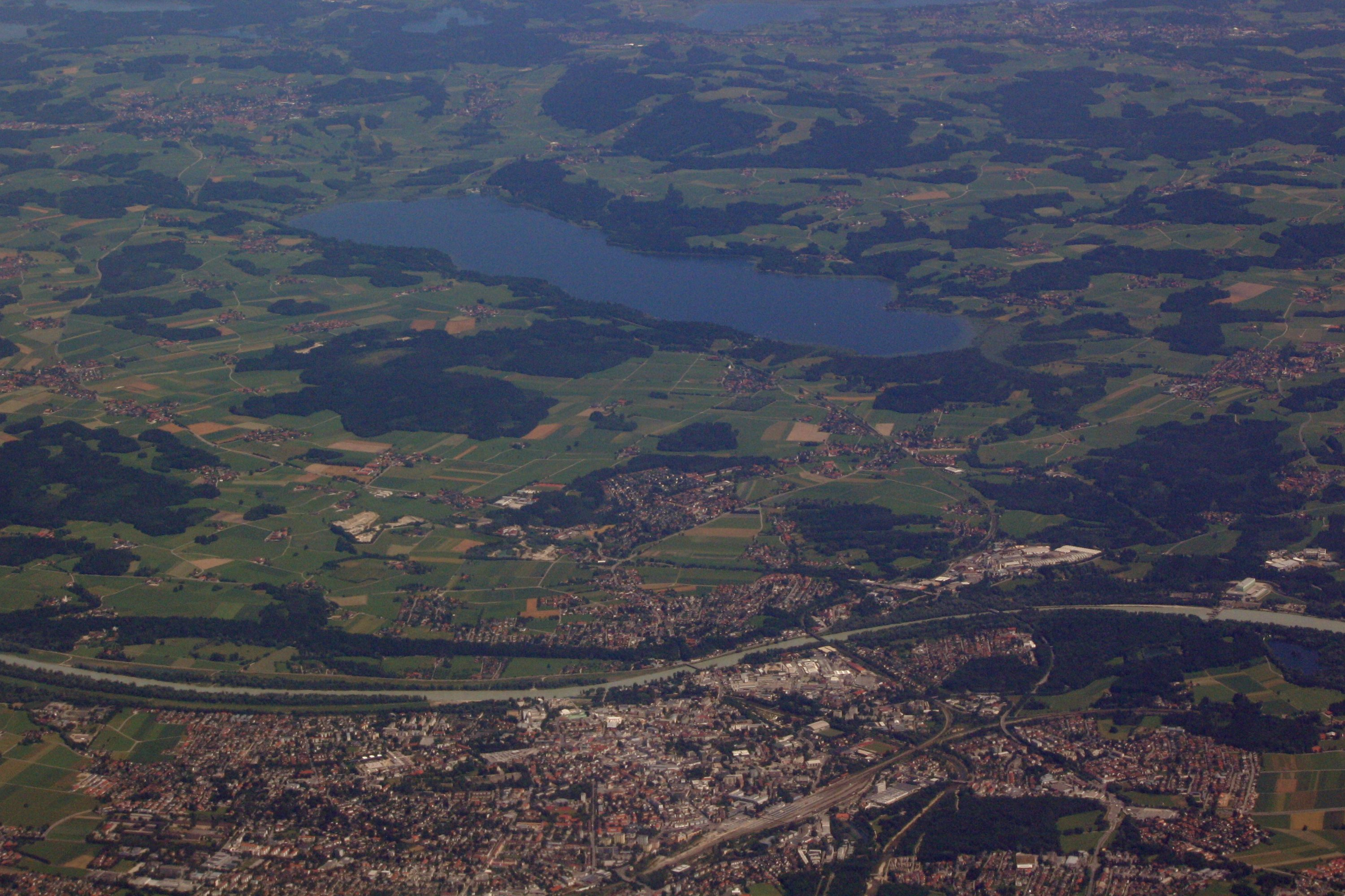 Luftbild Rosenheim